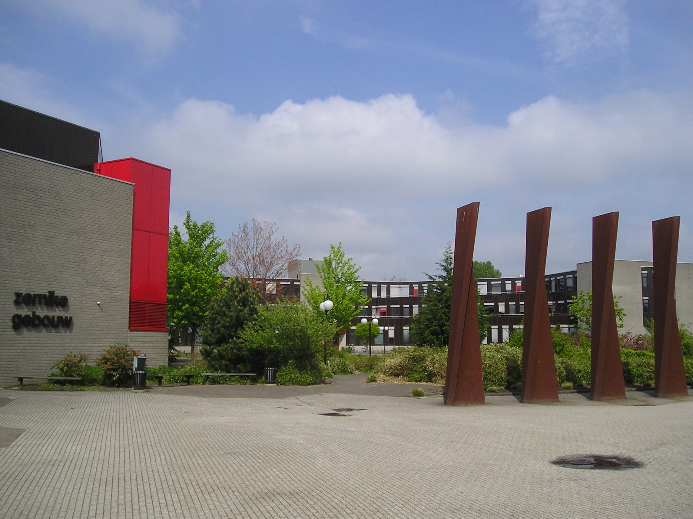 Gebouw van de Faculteit Wiskunde en Natuurwetenschappen voor de studie sterrenkunde en voor het Kapteyn Instituut./sculpture (7 part) zonder titel (1984) by Evert Strobos in Groningen/The Netherlands Foto is eigen werk